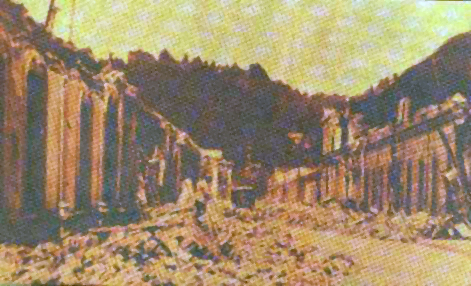 Imagen de la Calle Barros Arana en Concepción, Chile, luego del Terremoto de Chillán de 1939.